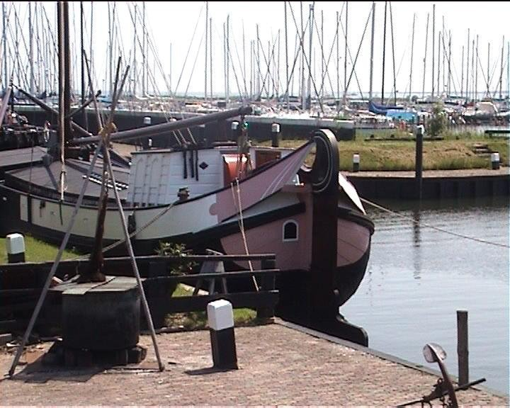 Tjalk